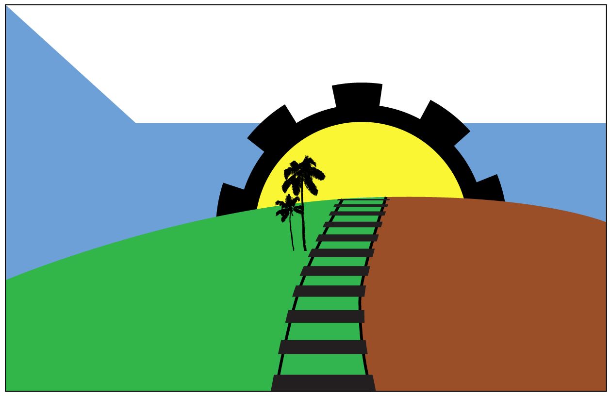 El 28 de julio de 2012 fue presentado oficialmente ante el pueblo en un acto conmemorativo por el aniversario de creación de Mantilla el diseño ganador del concurso. El primer ejemplar fue donado por su creador: Roberto Carlos Meza Niella y es el que actualmente es usado en los actos protocolares.